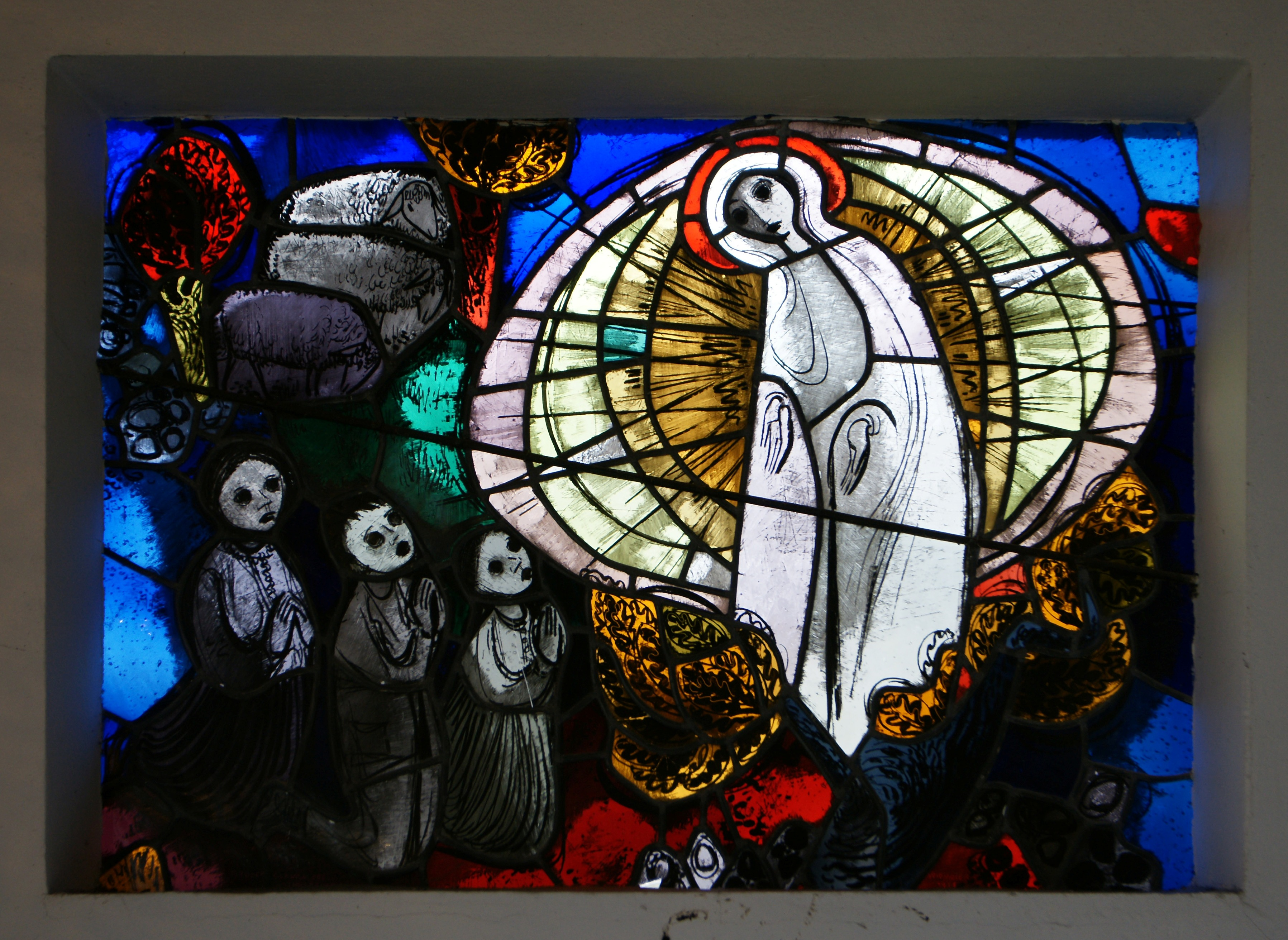 Fensterbild im Windfang der Kapelle zu Unserer Lieben Frau von Fatima auf dem Stollen auf am Geserberg in Langen bei Bregenz.aus dem DEHIO Vorarlberg 1983: 1952 nach Plänen von Willibald Braun erbaut.